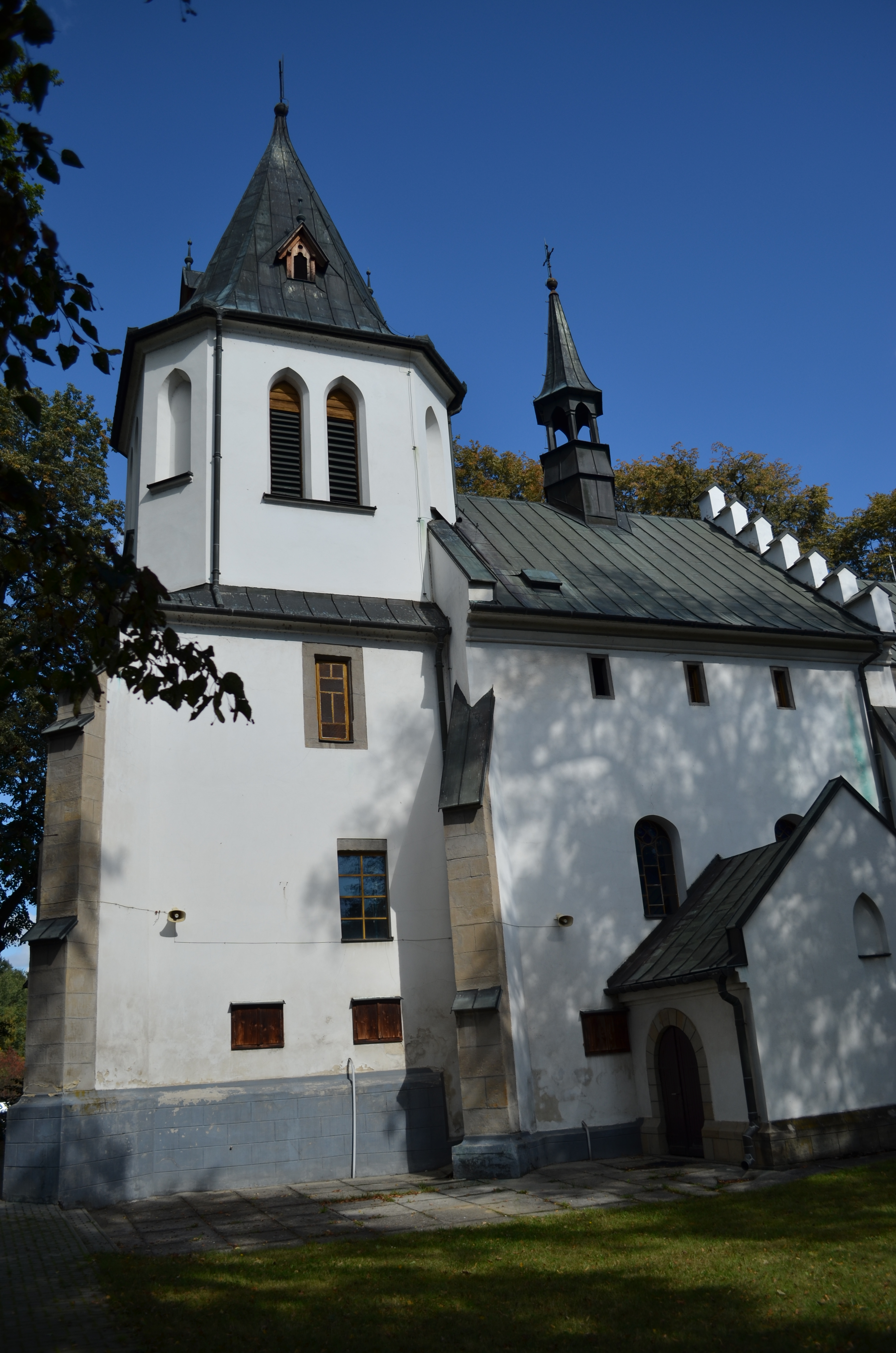 Gnojnik, kościół par. p.w. św. Marcina, 1382, XVII, XIX